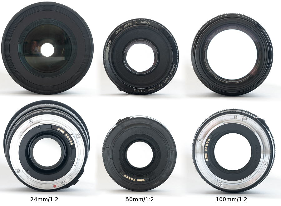 Gleiche Blendenzahl bei verschiedenen Brennweiten. Sichtbare Eintrittspupille (von vorne) und Austrittspupille (von hinten)